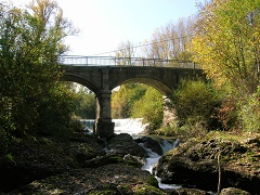 Foto sam